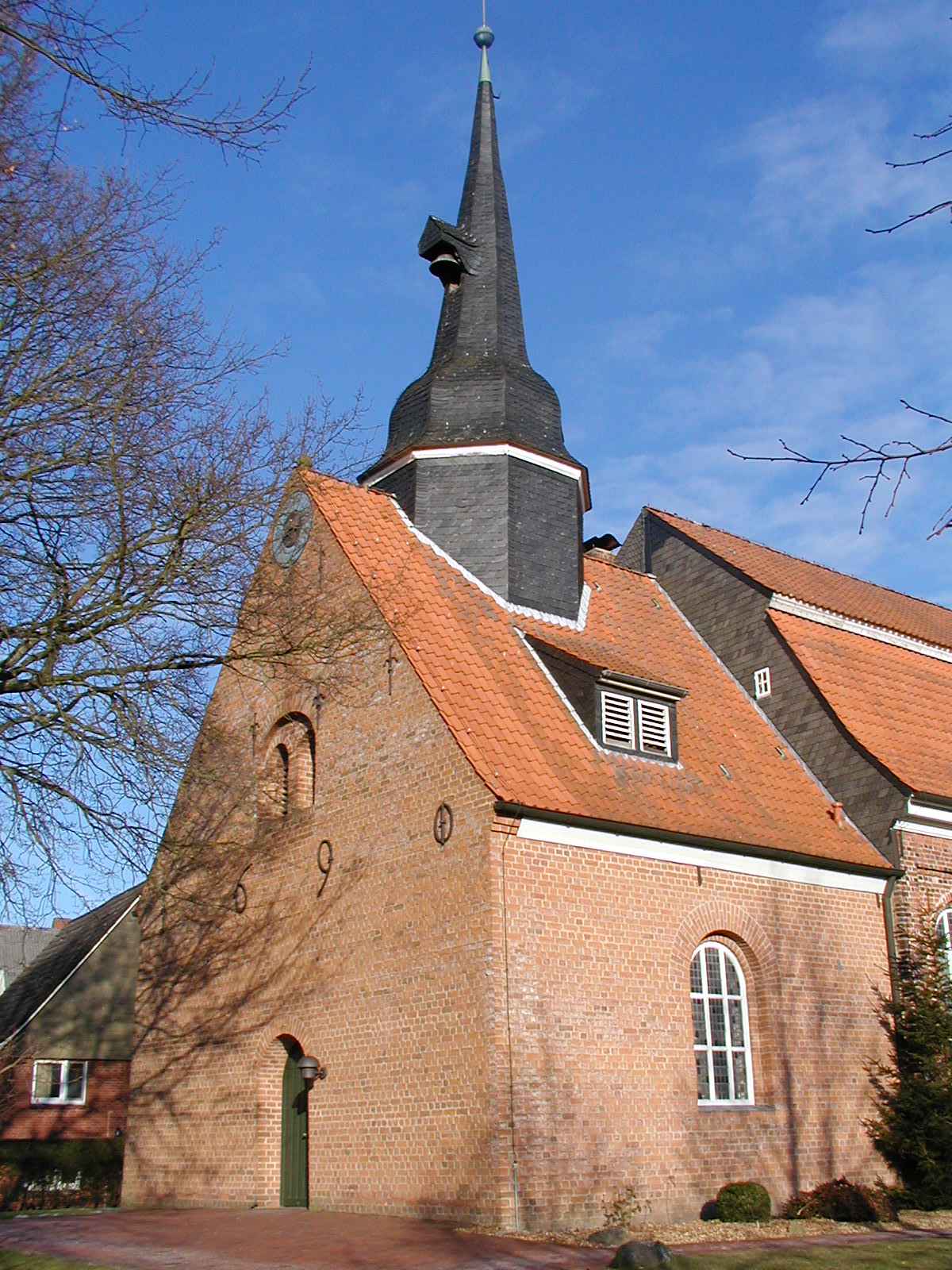 Der Kirchturm in Neuhaus (Oste)